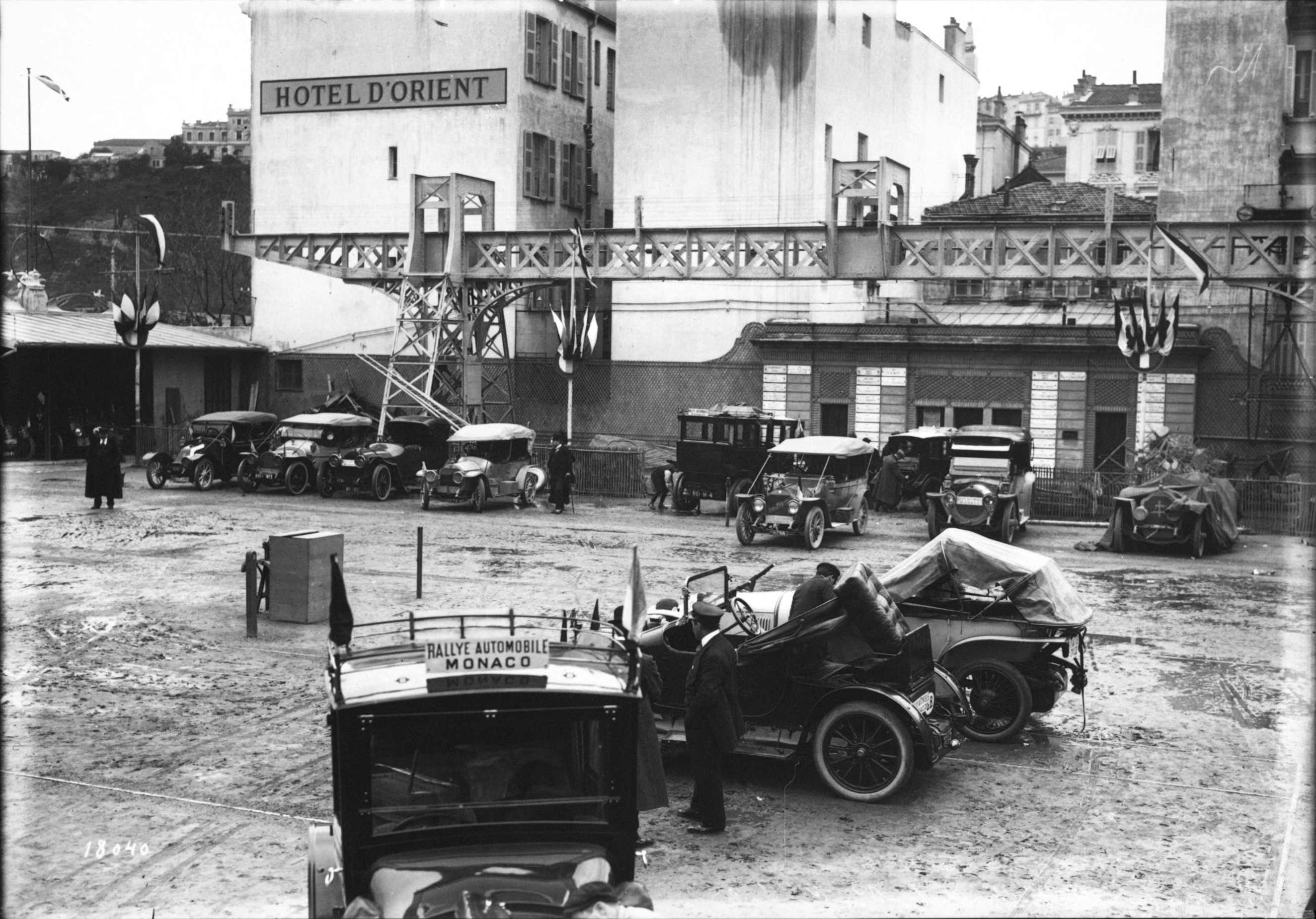 Participantes del Rally de Montecarlo de 1912